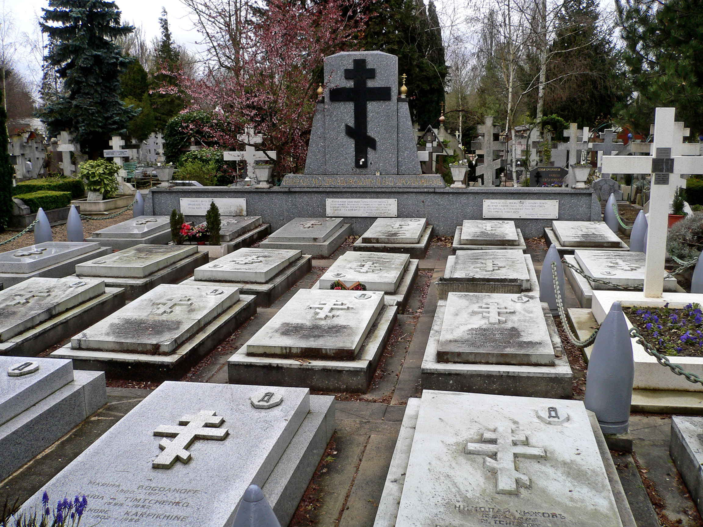 Tombes des membres de la division de Drozdovski à Sainte-Geneviève-des-Bois